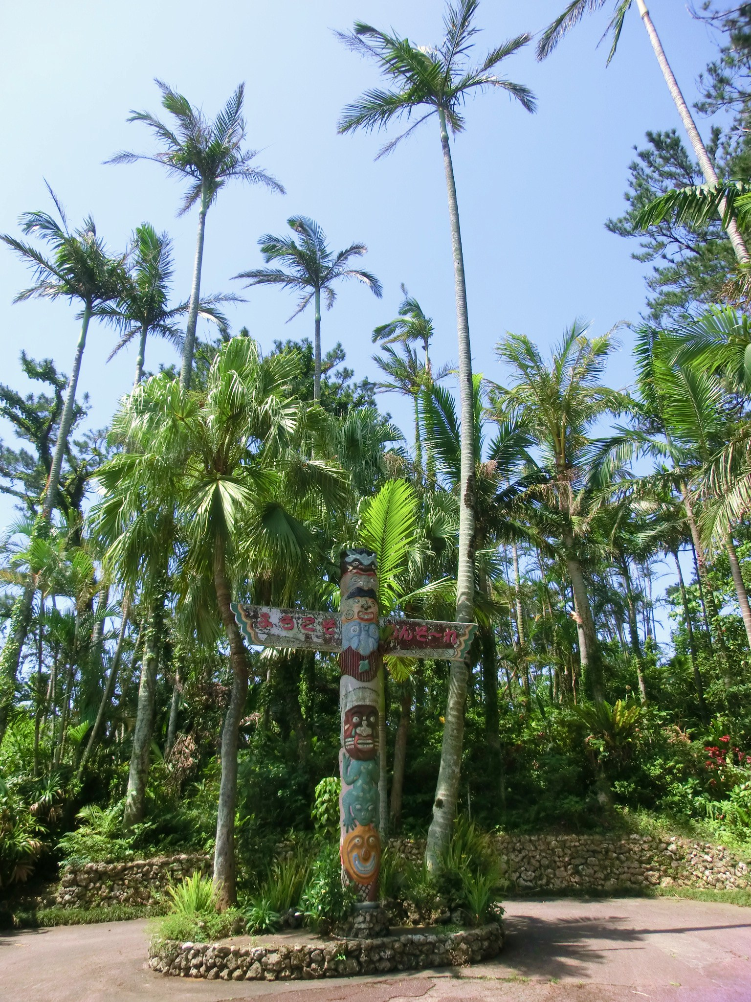 東南植物楽園のめんそーれトーテムポール